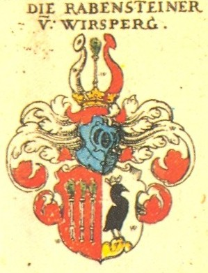 Wappen des fränkischen Adel- und Rittergeschlechts Rabensteiner von Wirsperg.